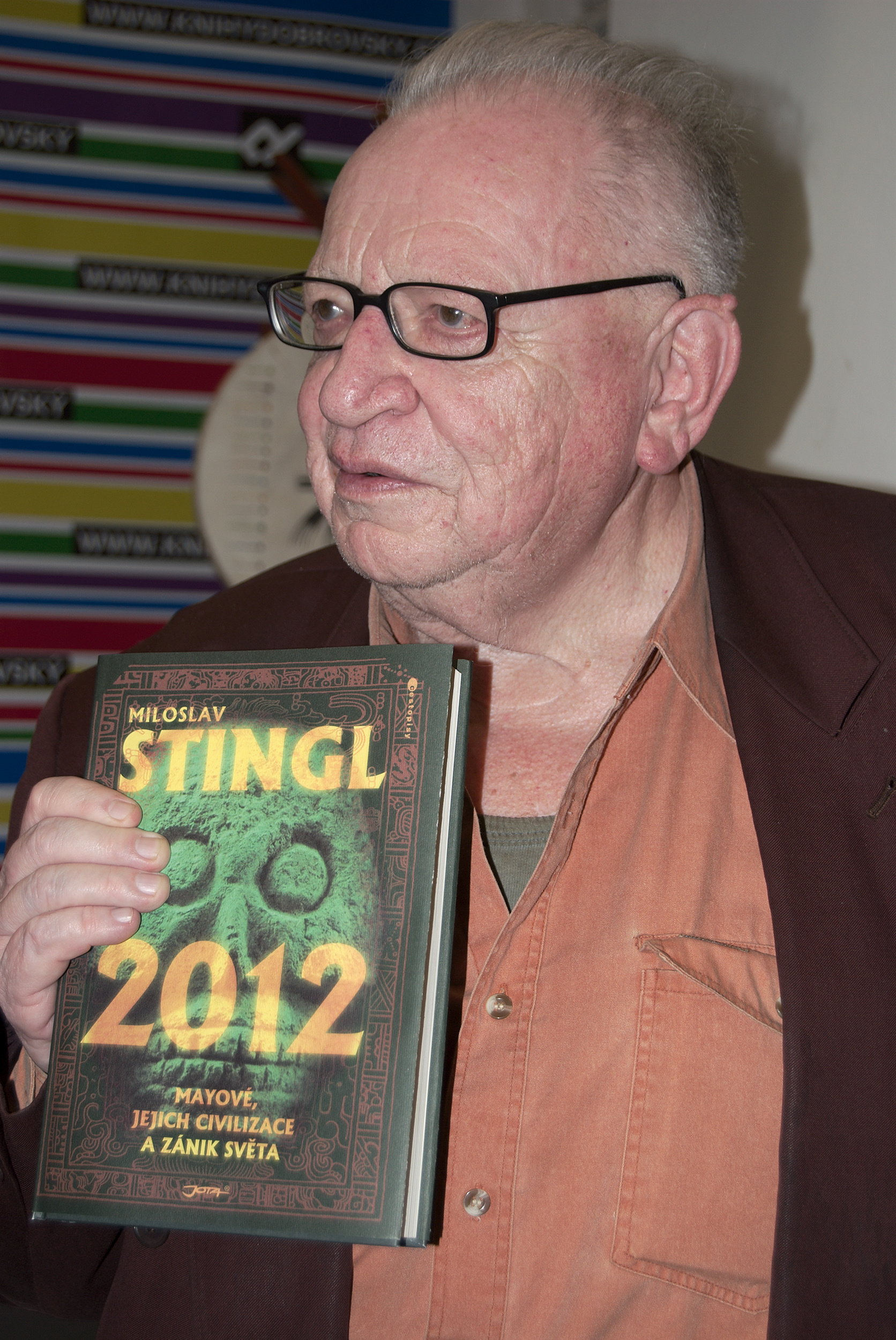 Miloslav Stingl na autogramiádě, v brněnském knihkupectví Knihy Dobrovský, konané dne 12. ledna 2011